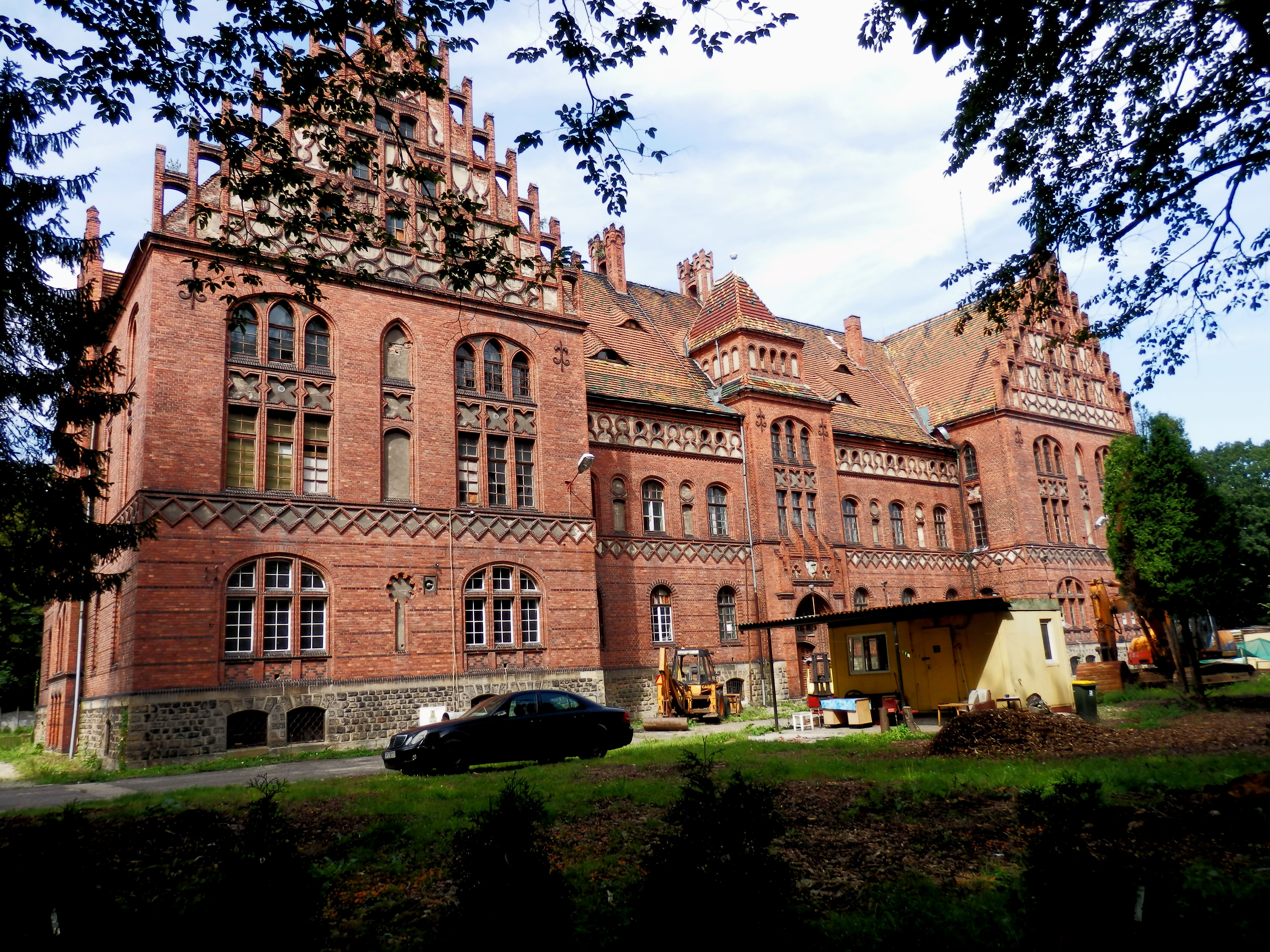 Pszczyna, budynek zarządu dóbr książęcych, tzw. paleja, 1902